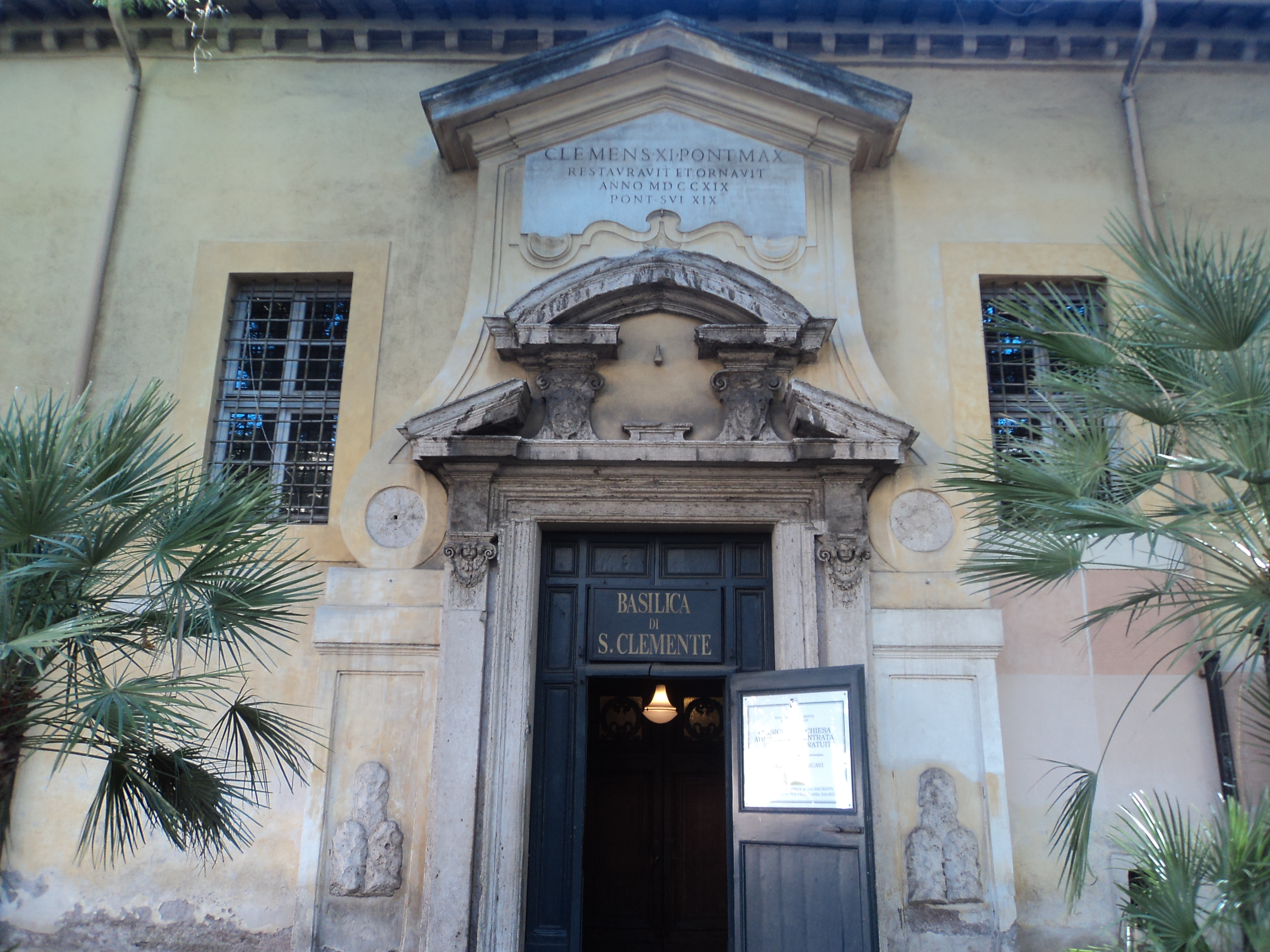 Basilica di San Clemente in Laterano, entrata da Via di San Giovanni in Laterano